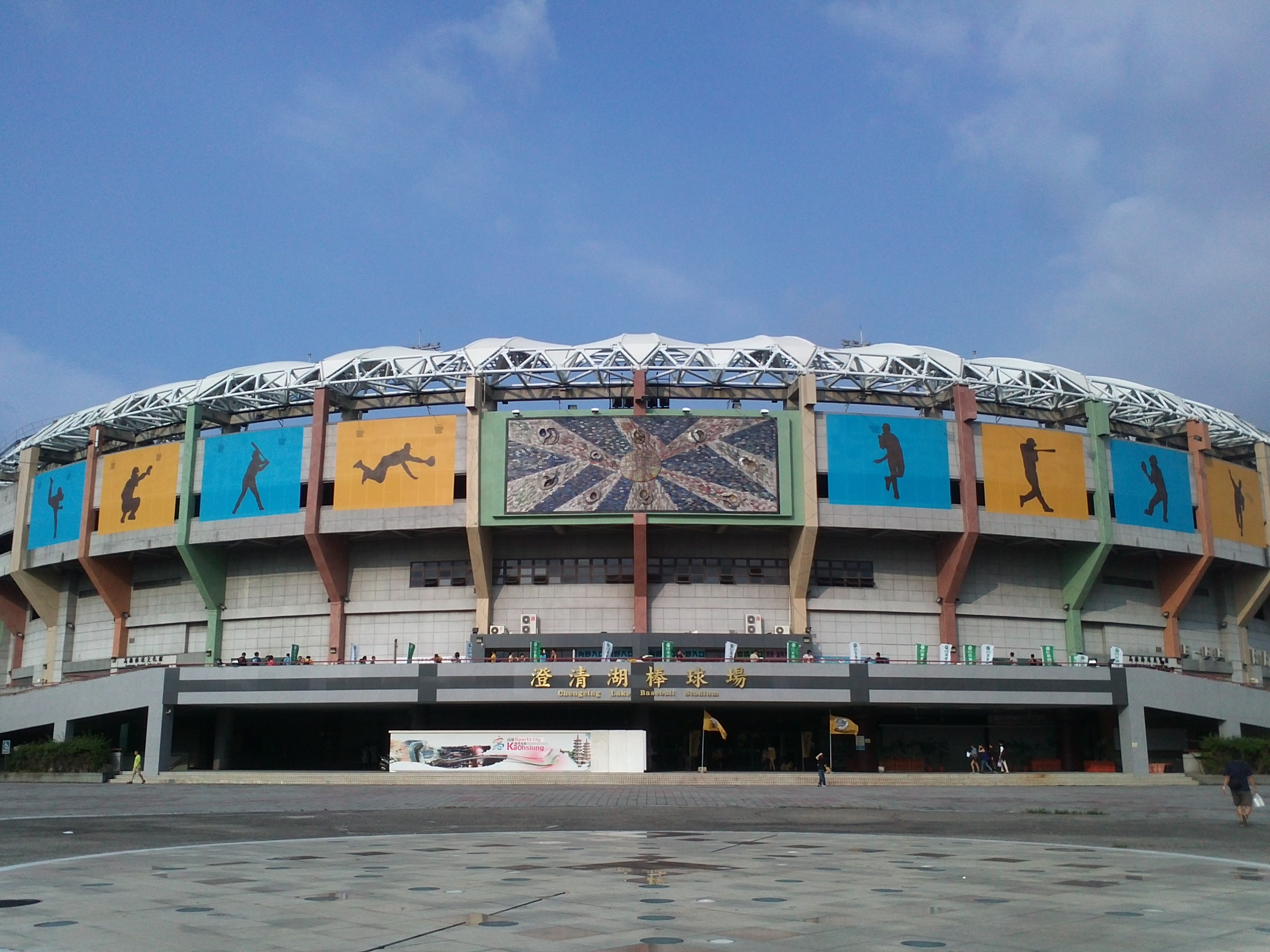 中文（台灣）: 澄清湖棒球場內野入口側。